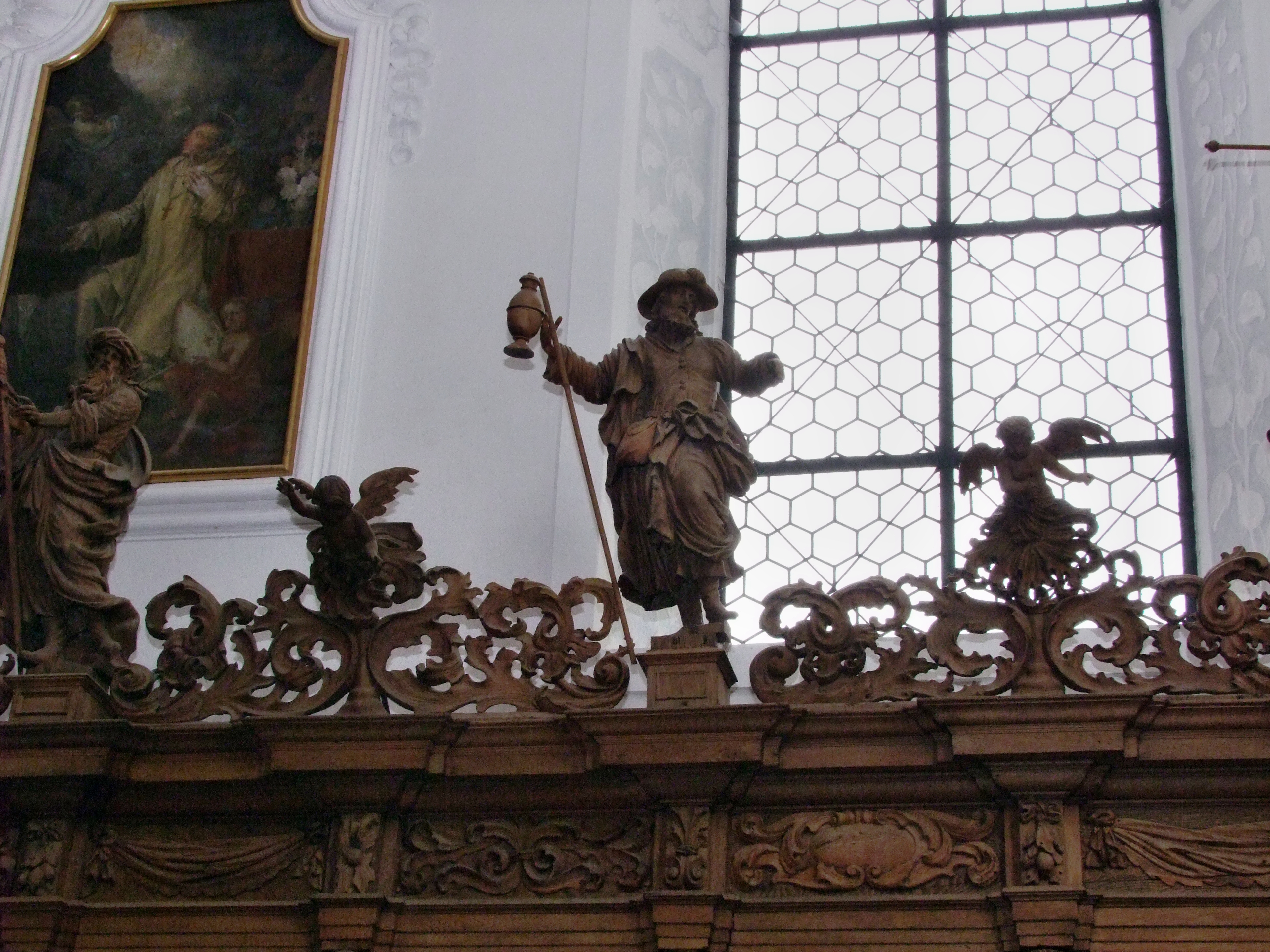 Chorgestühl in der ehemaligen Klosterkirche der Kartause in Buxheim bei Memmingen